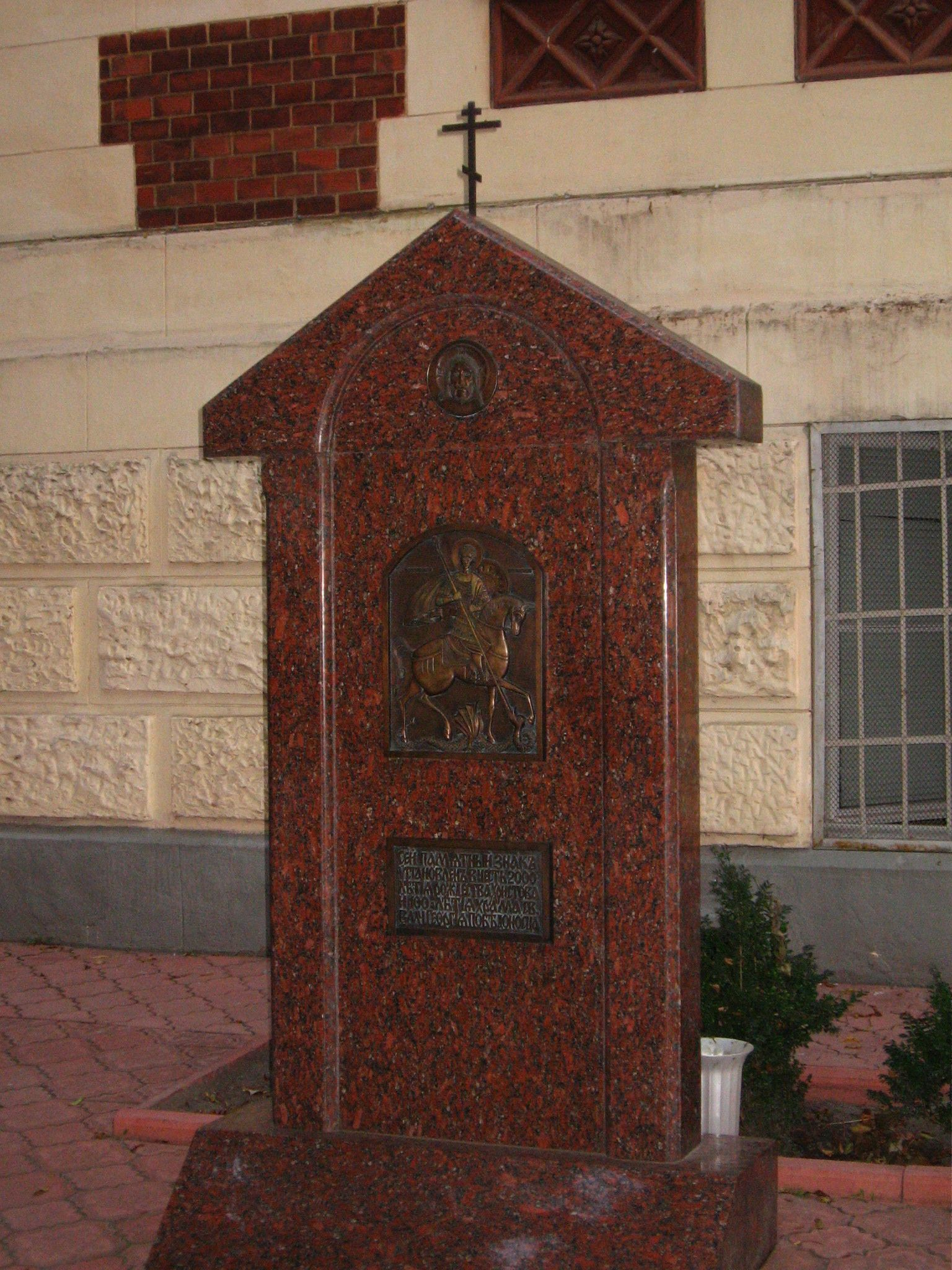 Памятник в честь двухтысячелетия Рождества Христового и столетия храма. Находится во дворе русской церкви во Львове.